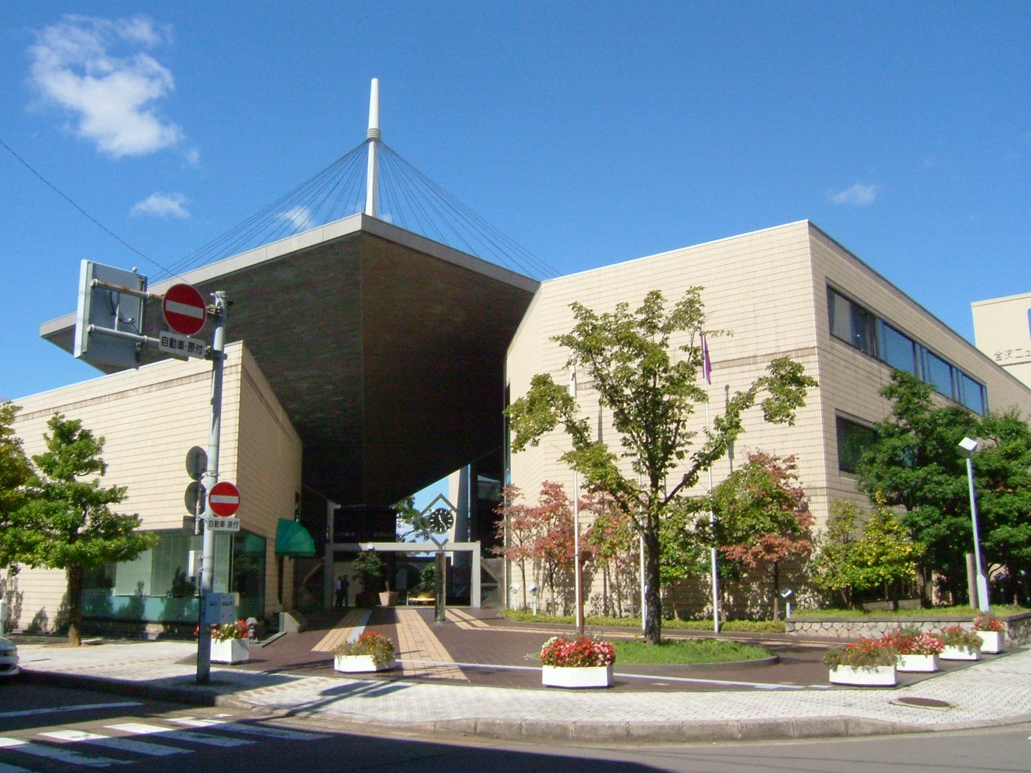 金沢市文化ホール（石川県金沢市）